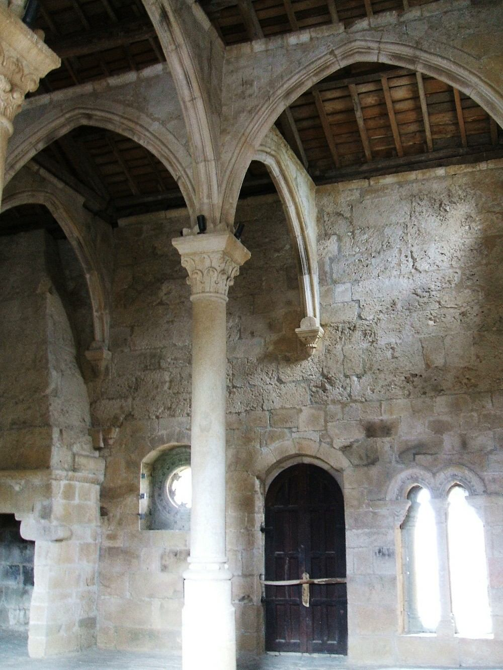 "Cocina de la Reina"; en el Monasterio de Santa María de Carracedo, en Carracedo del Monasterio, León, España